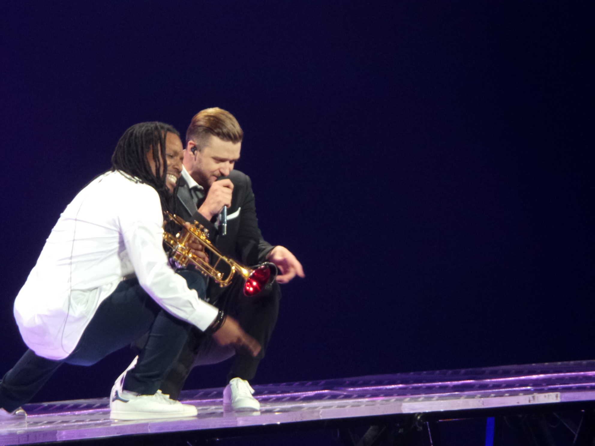 El músico estadounidense Justin Timberlake durante su gira The 2020 Experience World Tour en el recinto Time Warner Cable Arena de Charlotte, Carolina del Nortte, el 12 de julio de 2014.